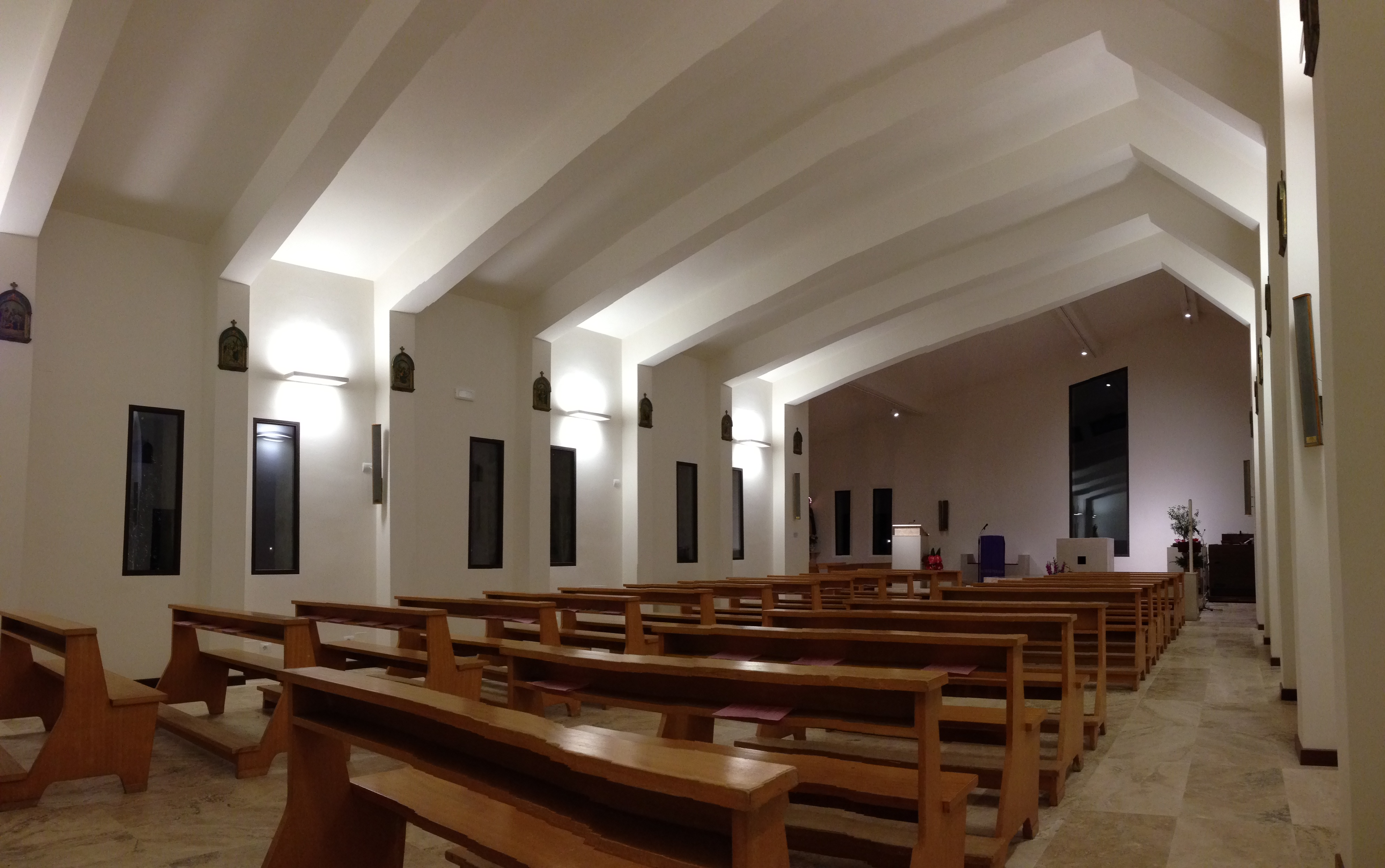 Interno delle Parrocchia San Cristoforo in Balanzano dopo l'ampliamento